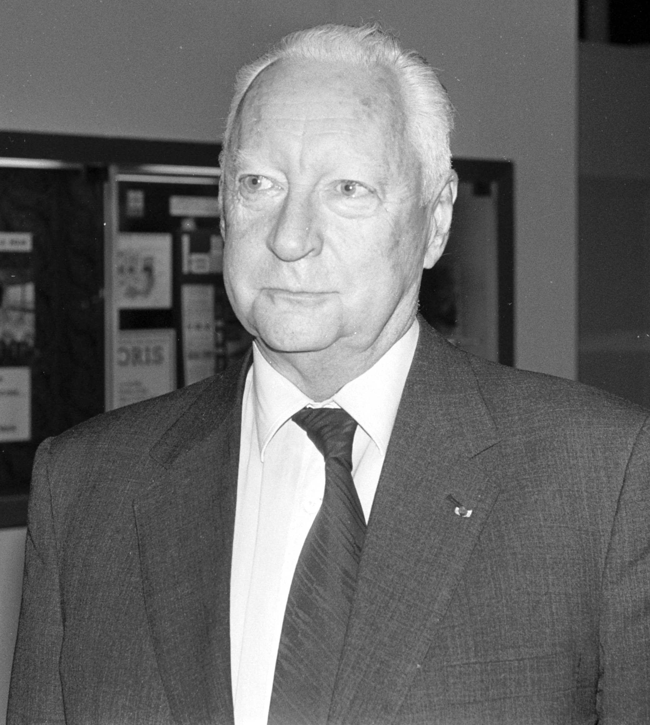 L'ancien Premier ministre français Pierre Messmer à Trouville (Normandie, Calvados) le 15 mars 1988.